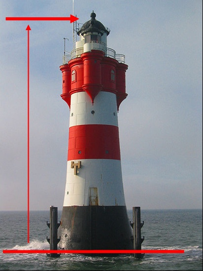 Feuerträgerhöhe = Höhe von Baugrund bis Dachfirst (Bekrönung)